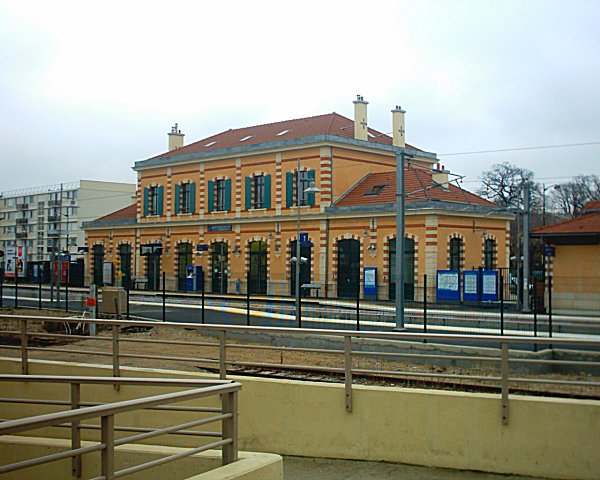 Gare de Saint Germain-en-Laye Grande Ceinture, Saint-Germain-en-Laye on 03/03/06.